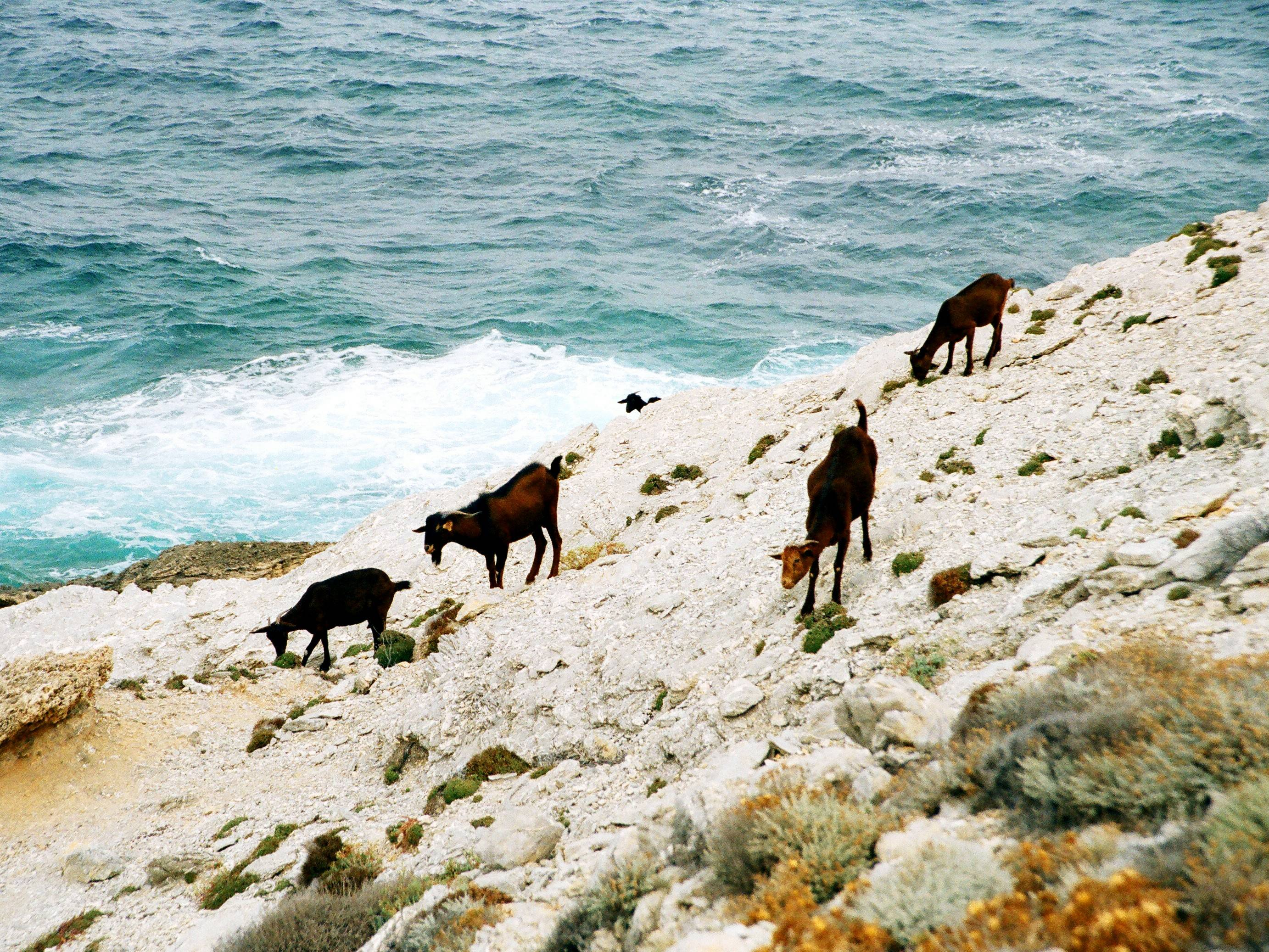 Wildziegen bei Cala Dèntol, Àrta, Mallorca, Spanien (Spain)